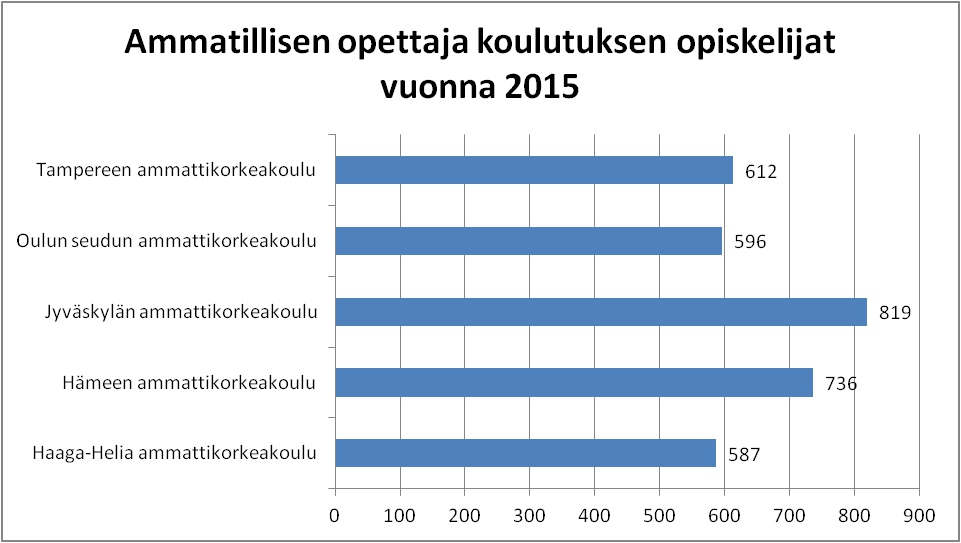 Ammatillisen opettajakoulutuksen opiskelijat vuonna 2015